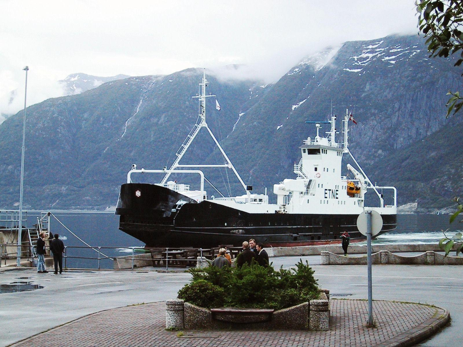 M/F Etne, built 1979.